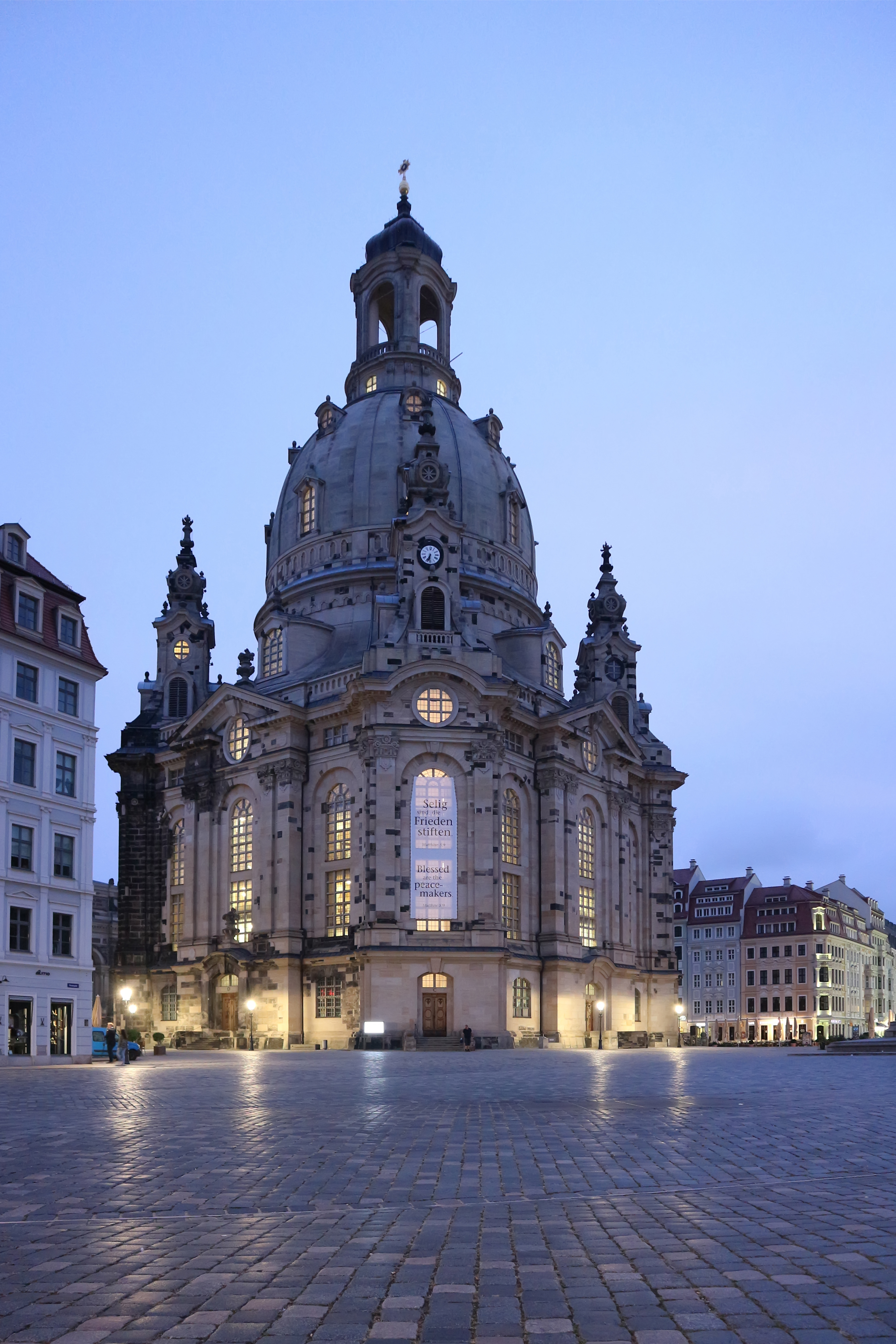 Die Dresdener Frauenkirche auf dem Neumarkt in der Dämmerung